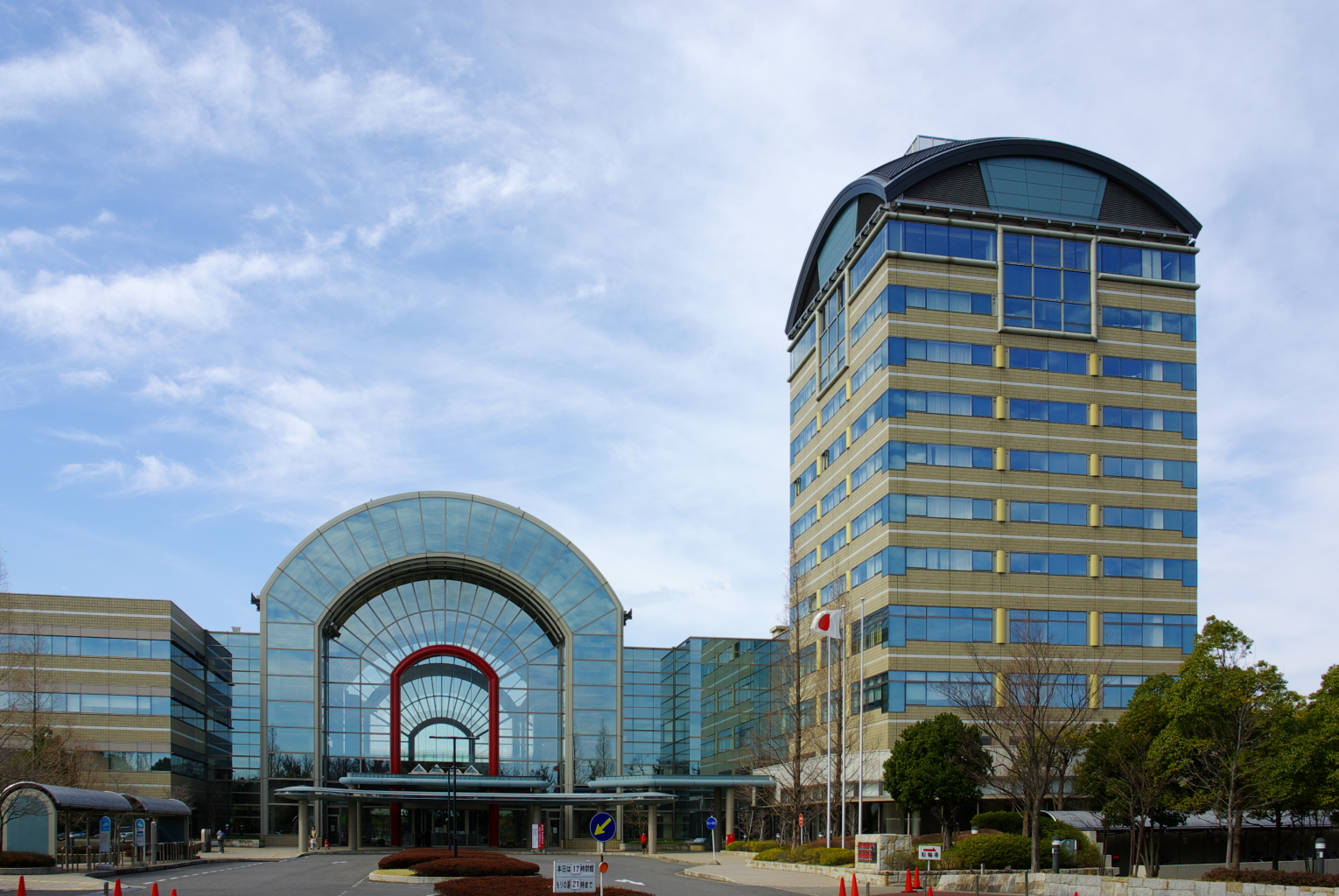 あいち健康プラザ東側より。デジタルシフト使用。